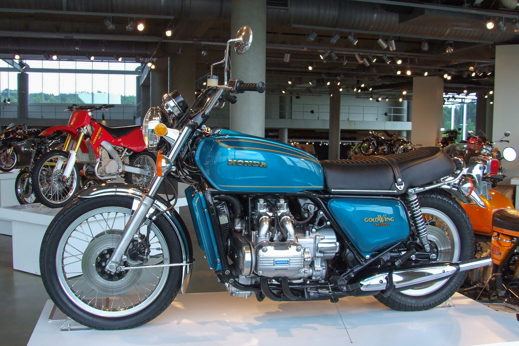 Honda Gold Wing GL1000 (1975) im Barber Vintage Motorsports Museum, Birmingham Alabama USA